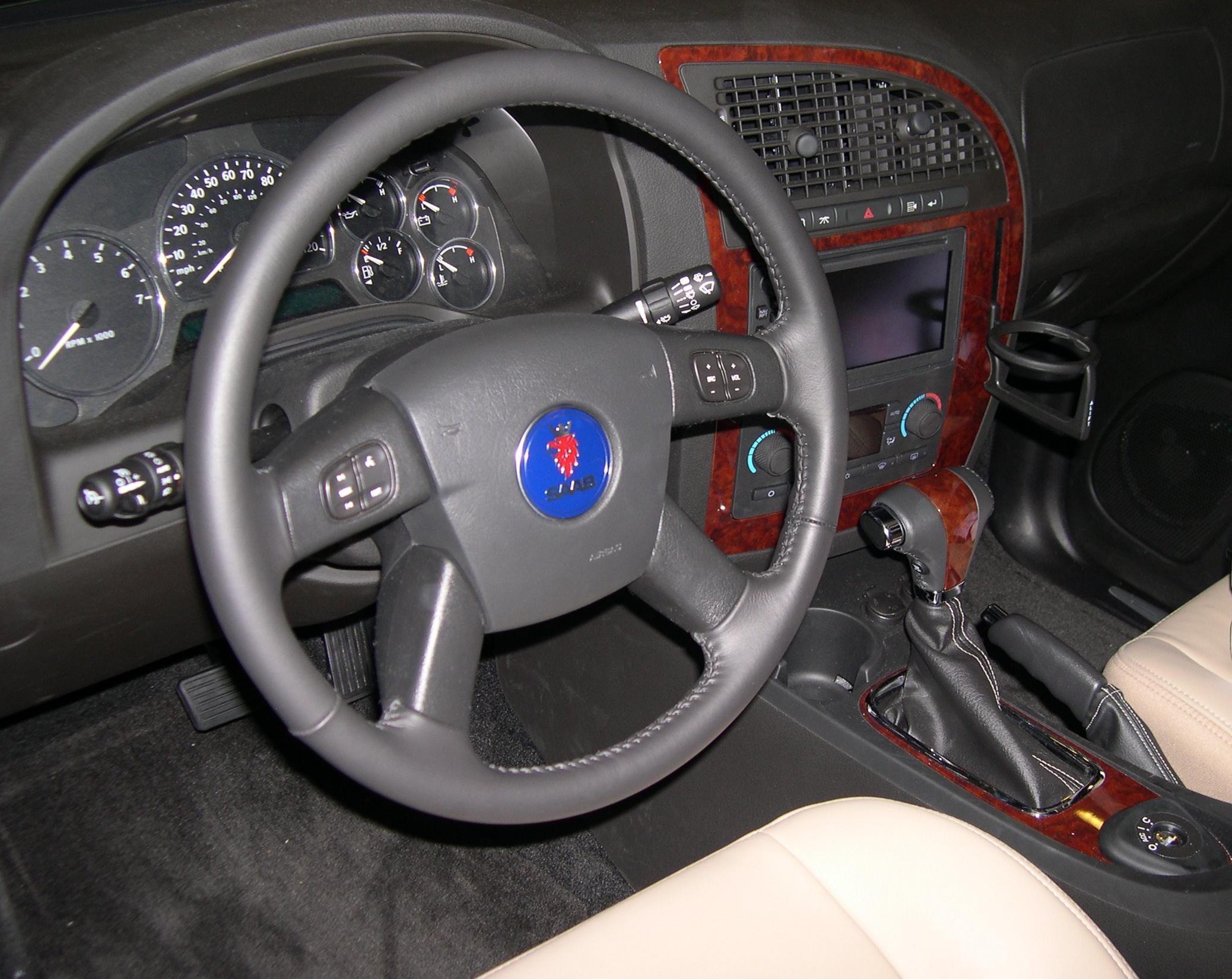 2006 Saab 9-7X interior